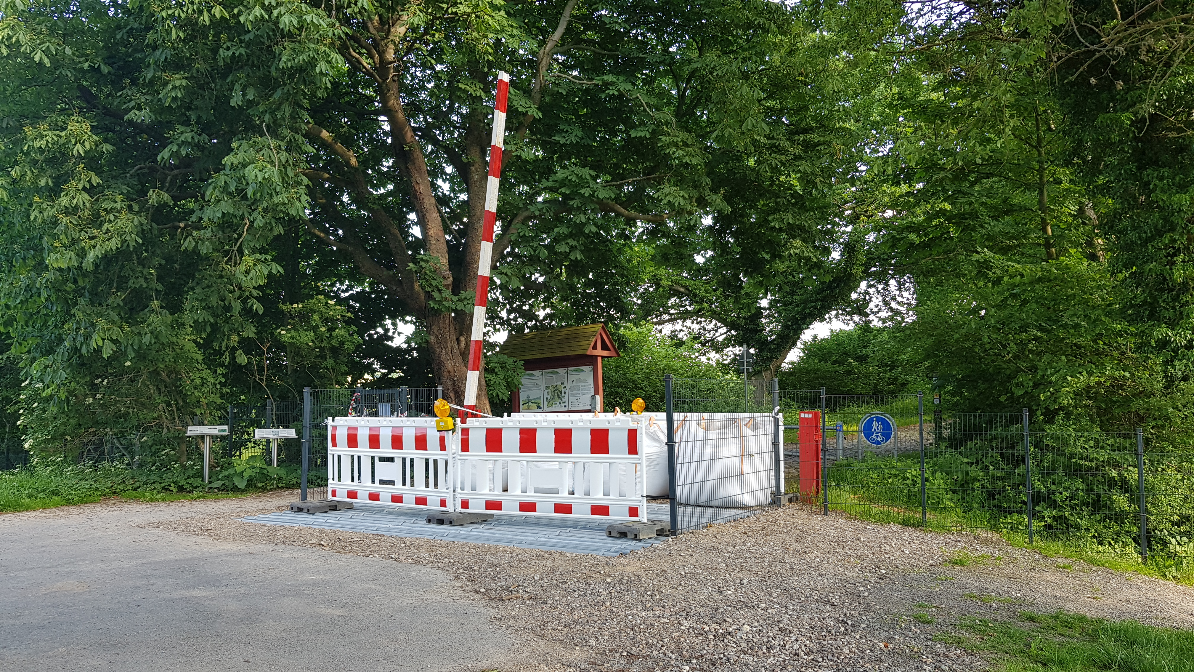 Rønsdam grænse med vildsvinehegn og spærringer pga coronakrisen